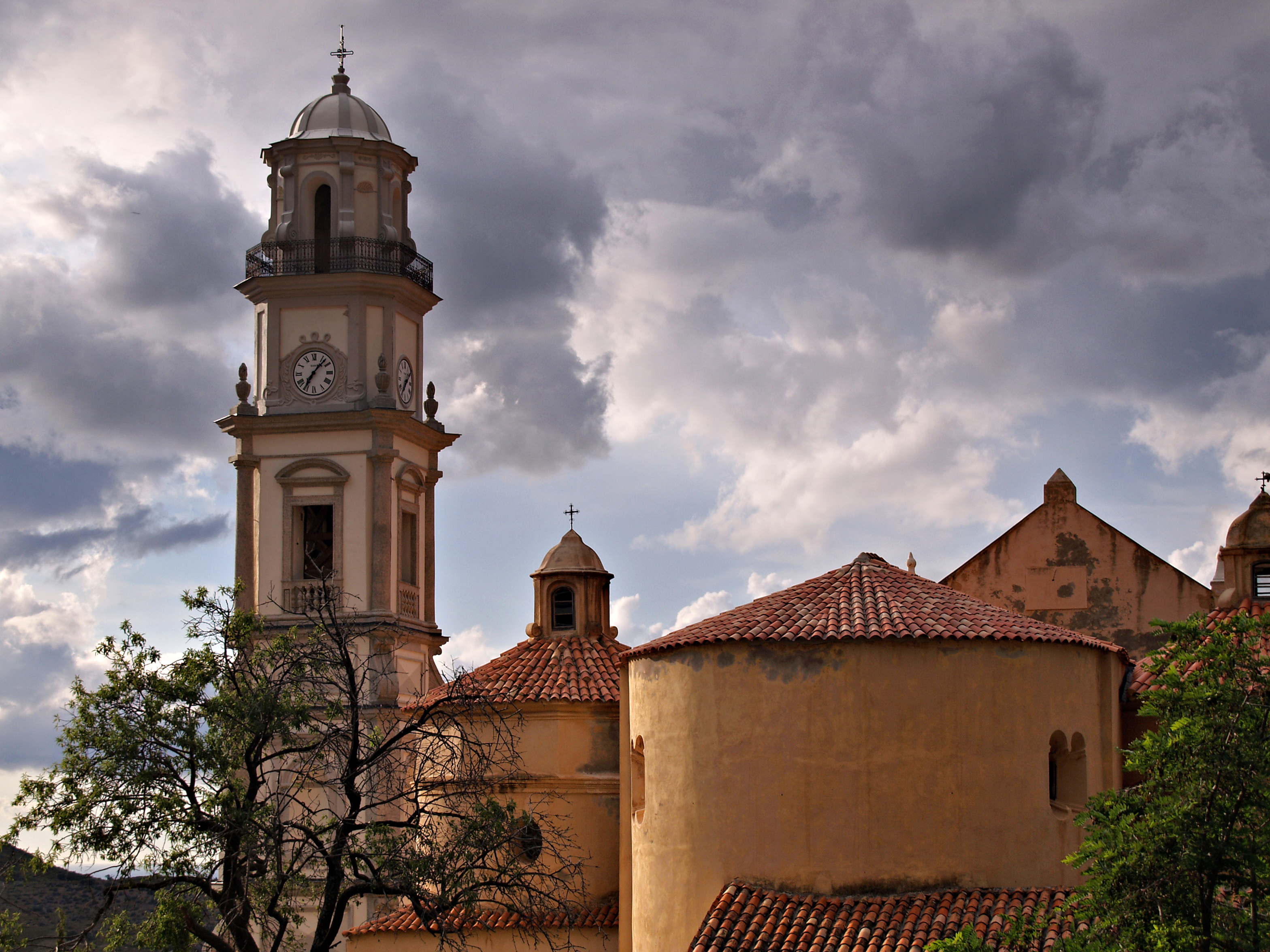 Calenzana (Haute-Corse) - Église Saint-Blaise et son clocher, monument historique